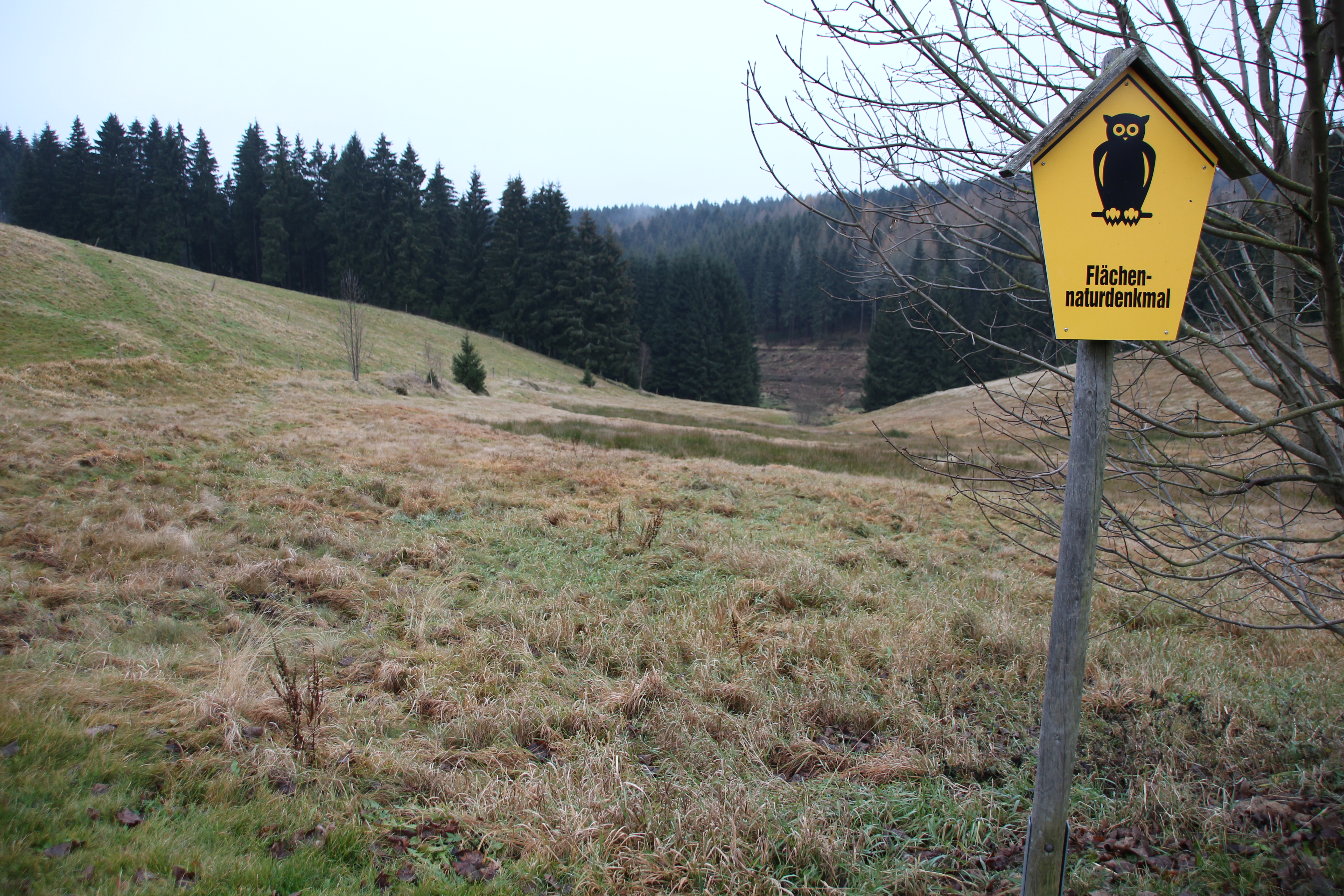 Der Heinzwinkel ist ein Ortsteil der im westlichsten Zipfel des sächsischen Erzgebirges gelegenen Gemeinde Schönheide (Erzgebirgskreis). Dieser Ortsteil liegt im süd-westlichen Teil von Schönheide und wird durch die Wiesenstraße erschlossen. Das Gelände fällt vom östlichen Rand der kleinen Siedlung nach Westen hin ab in Richtung Tannenbach, dessen Osthang als Fächennaturdenkmal ausgewiesen ist und unter Schutz steht (Paragraph 18 des Sächsischen Naturschutzgesetzes Text beim Bundesamt für Naturschutz, abgerufen am 21. Dezember 2014) Paragraph 28 des Bundesnaturschutzgesetzes, auf den das sächsische Gesetz verweist, lautet: „§ 28 Naturdenkmäler (1) Naturdenkmäler sind rechtsverbindlich festgesetzte Einzelschöpfungen der Natur oder entsprechende Flächen bis zu fünf Hektar, deren besonderer Schutz erforderlich ist 1. aus wissenschaftlichen, naturgeschichtlichen oder landeskundlichen Gründen oder 2. wegen ihrer Seltenheit, Eigenart oder Schönheit. (2) Die Beseitigung des Naturdenkmals sowie alle Handlungen, die zu einer Zerstörung, Beschädigung oder Veränderung des Naturdenkmals führen können, sind nach Maßgabe näherer Bestimmungen verboten.“